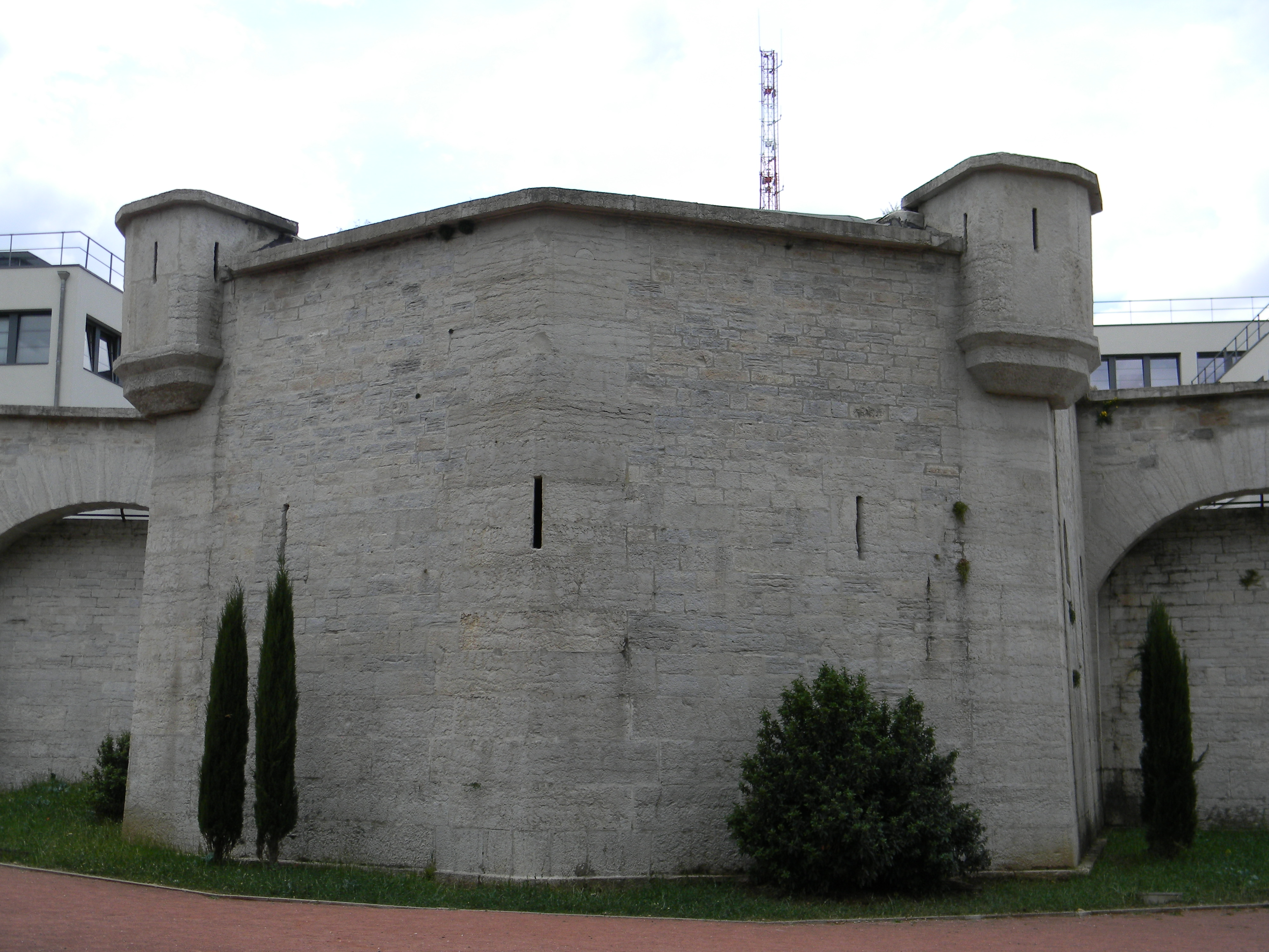 Bastion du fort Montluc à Lyon